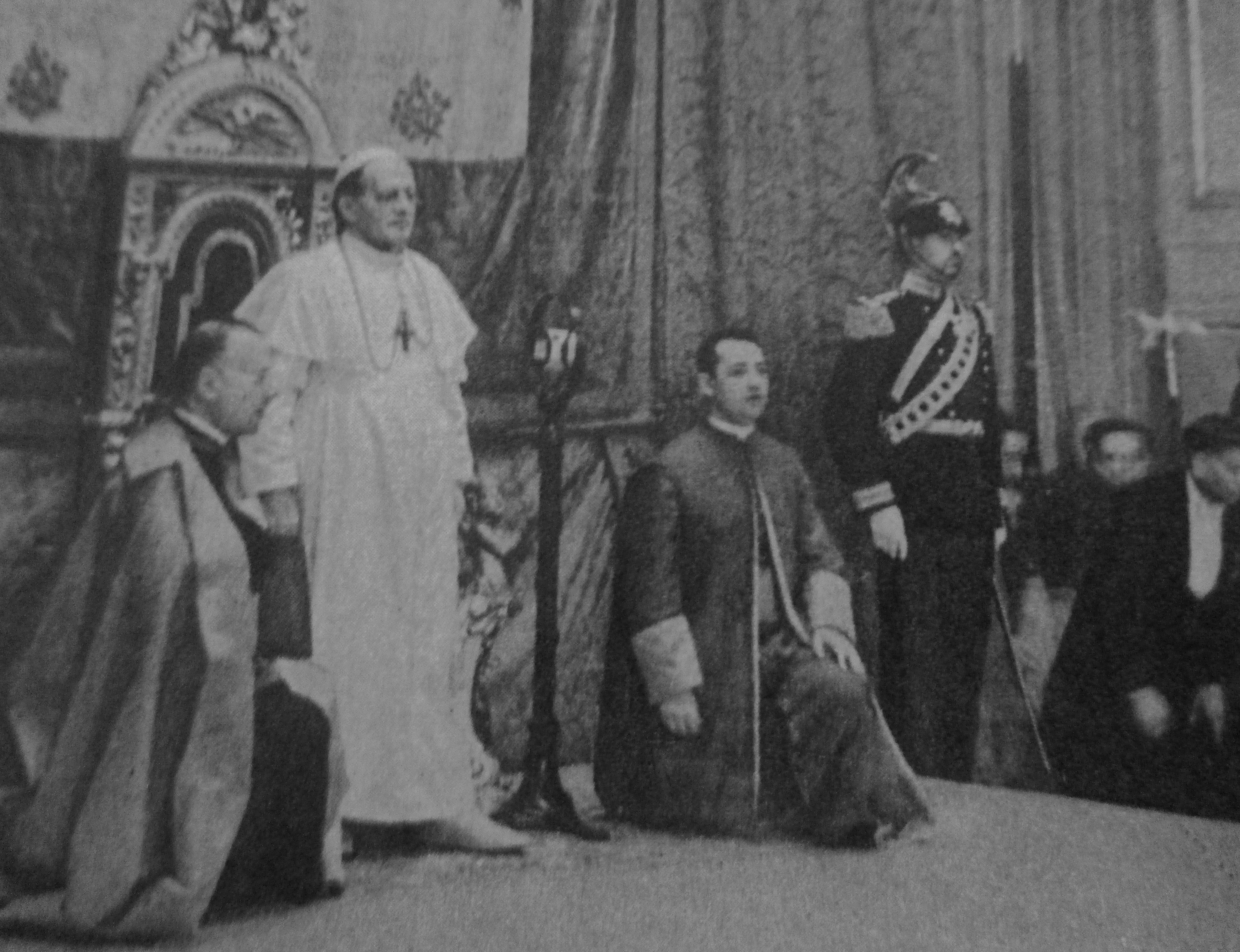 Pie XI en audience, photographie parue dans le numéro hors série de février 1939 de L'Illustration, consacré à la mort de Pie XI.